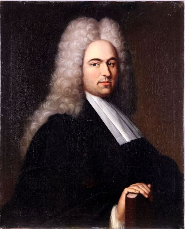 Portret in olieverf van Campegius (Kempe) Vitringa junior, professor in de godgeleerdheid aan de Franeker universiteit van 1716 tot 1723. Campegius Vitringa jr. (Franeker 24 maart 1693 - Franeker 11 januari 1723) was een zoon van Campegius Vitringa (SCH0093) en studeerde in Franeker, Leiden en Utrecht. (Tekst Museum Martena, Franeker)